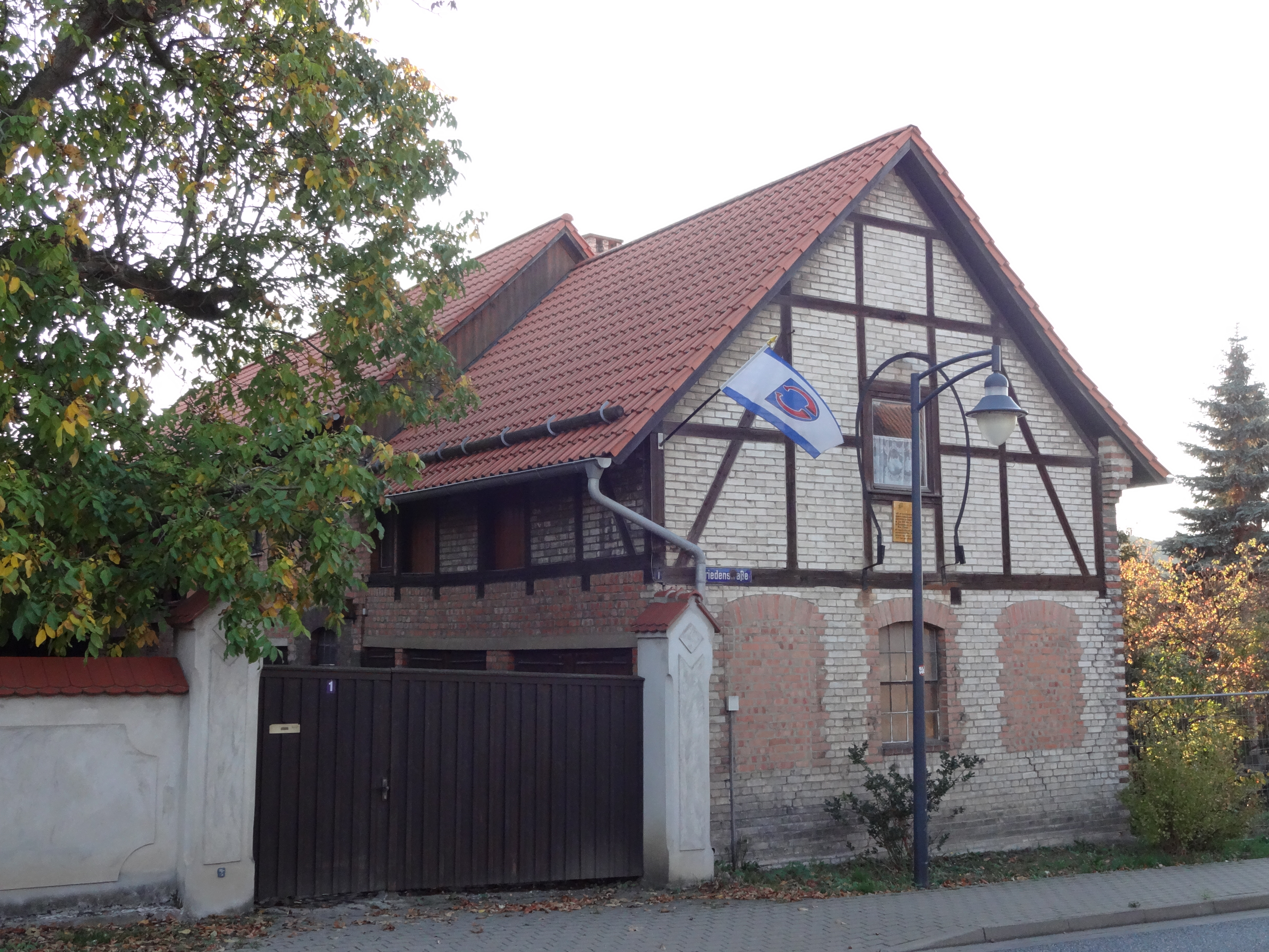 Denkmalgeschütztes Haus in der Friedensstraße 1 in Darlingerode; ehemalige Schmiede